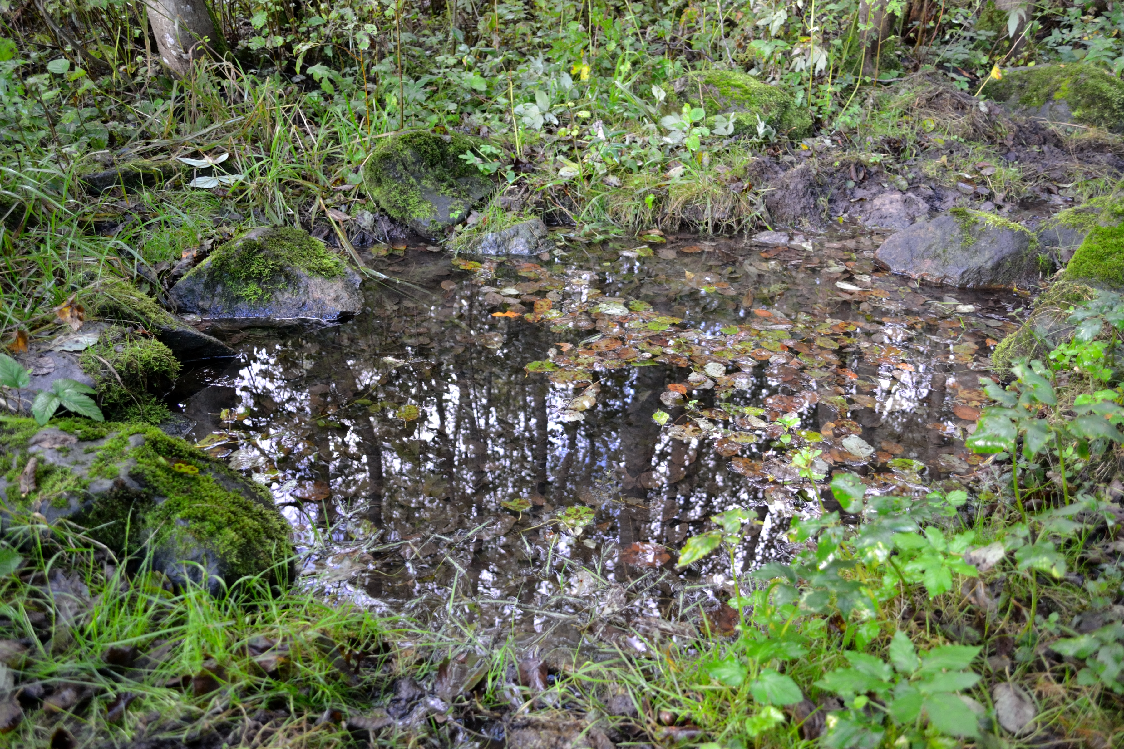 Ohvriallikas "Sõeru allikas" Aadress: Harju maakond, Saue vald, Vanamõisa küla Kubjamõisa